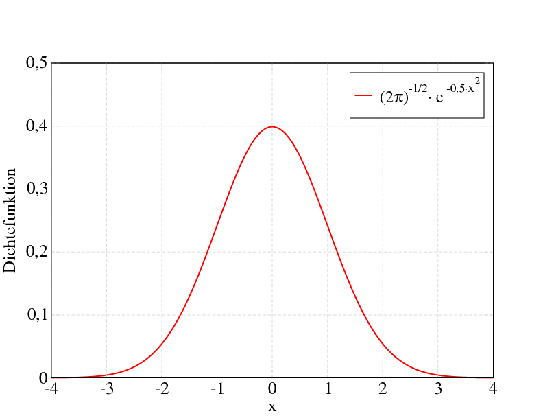 Dichtefunktion der Standardnormalverteilung.